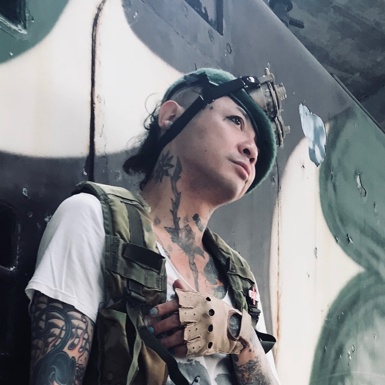 モトアキ（Kaikigesshoku, solo)